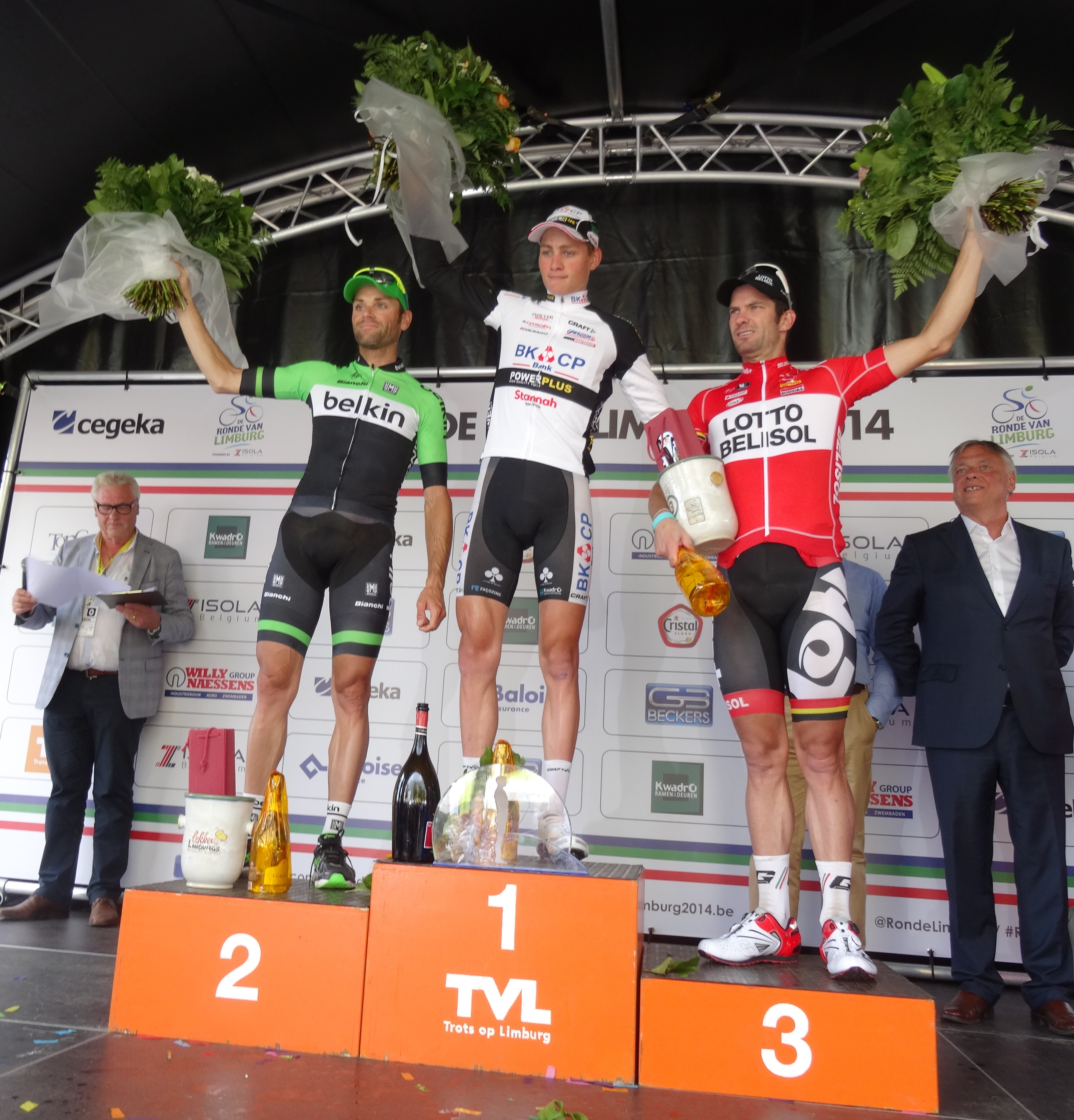 Reportage photographique réalisé le dimanche 15 juin à l'occasion du départ et de l'arrivée du Tour du Limbourg 2014 à Tongres, Belgique.